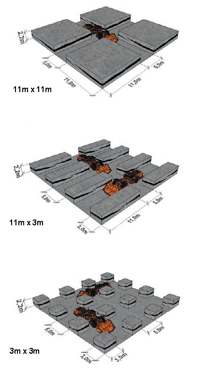 Método de exploração actual - Câmaras e Pilares